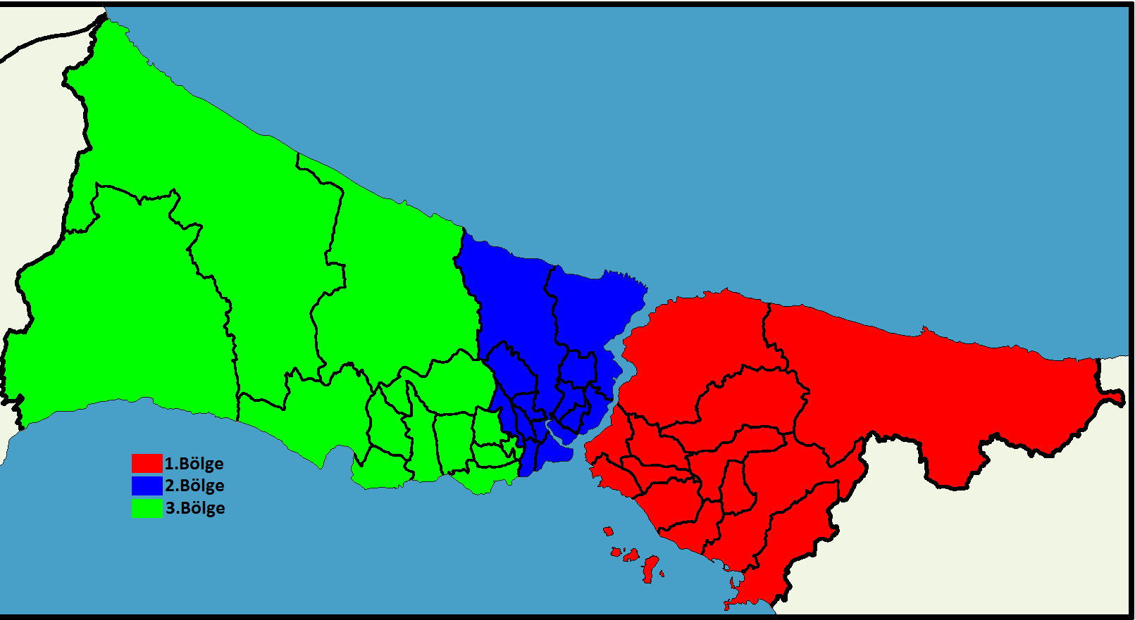 İstanbul İli Seçim Bölgeleri Haritası